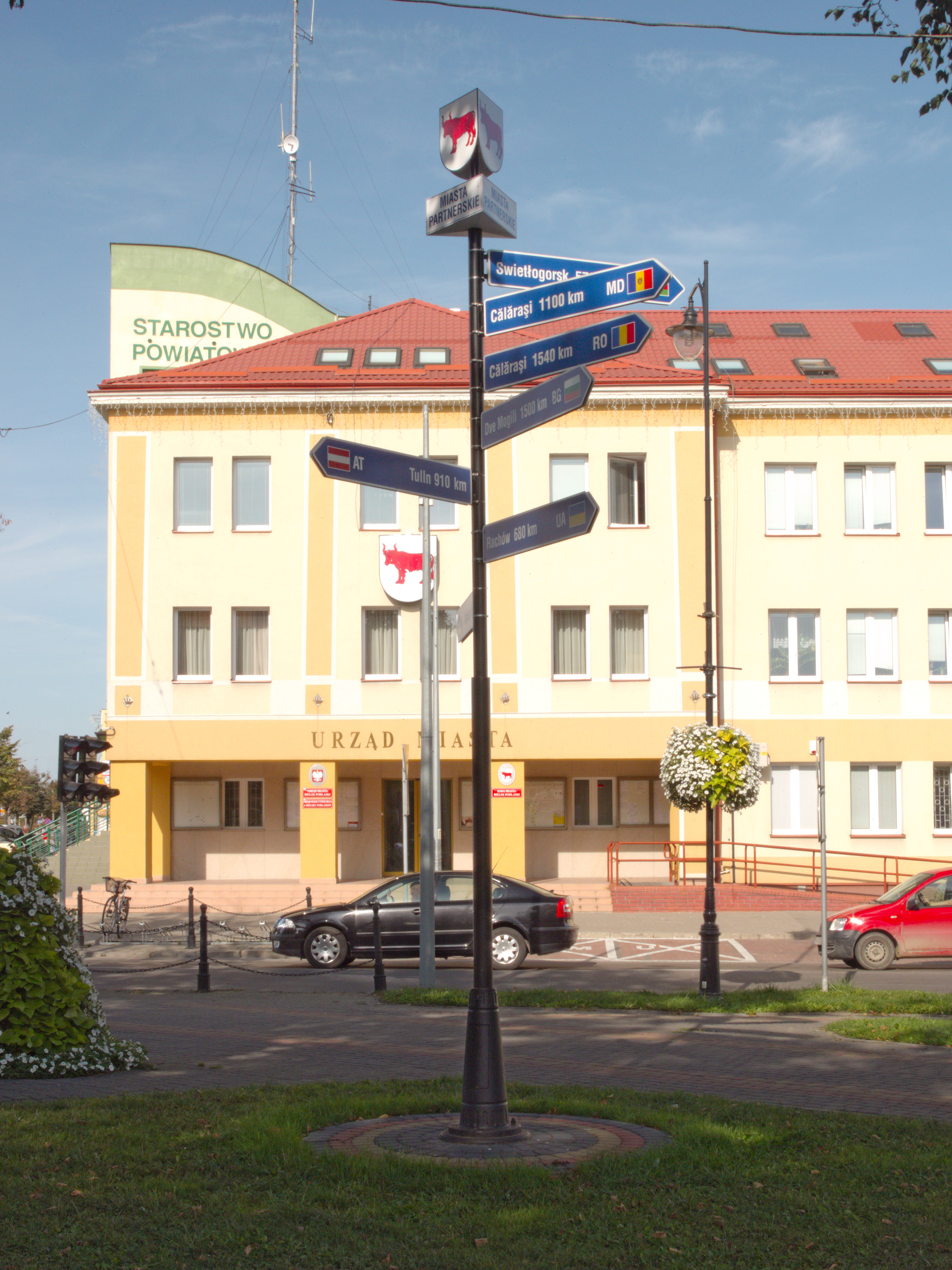 Drogowskaz z miastami partnerskimi stojący w sąsiedztwie Urzędu Miasta i Starostwa Powiatowego w Bielsku Podlaskim.